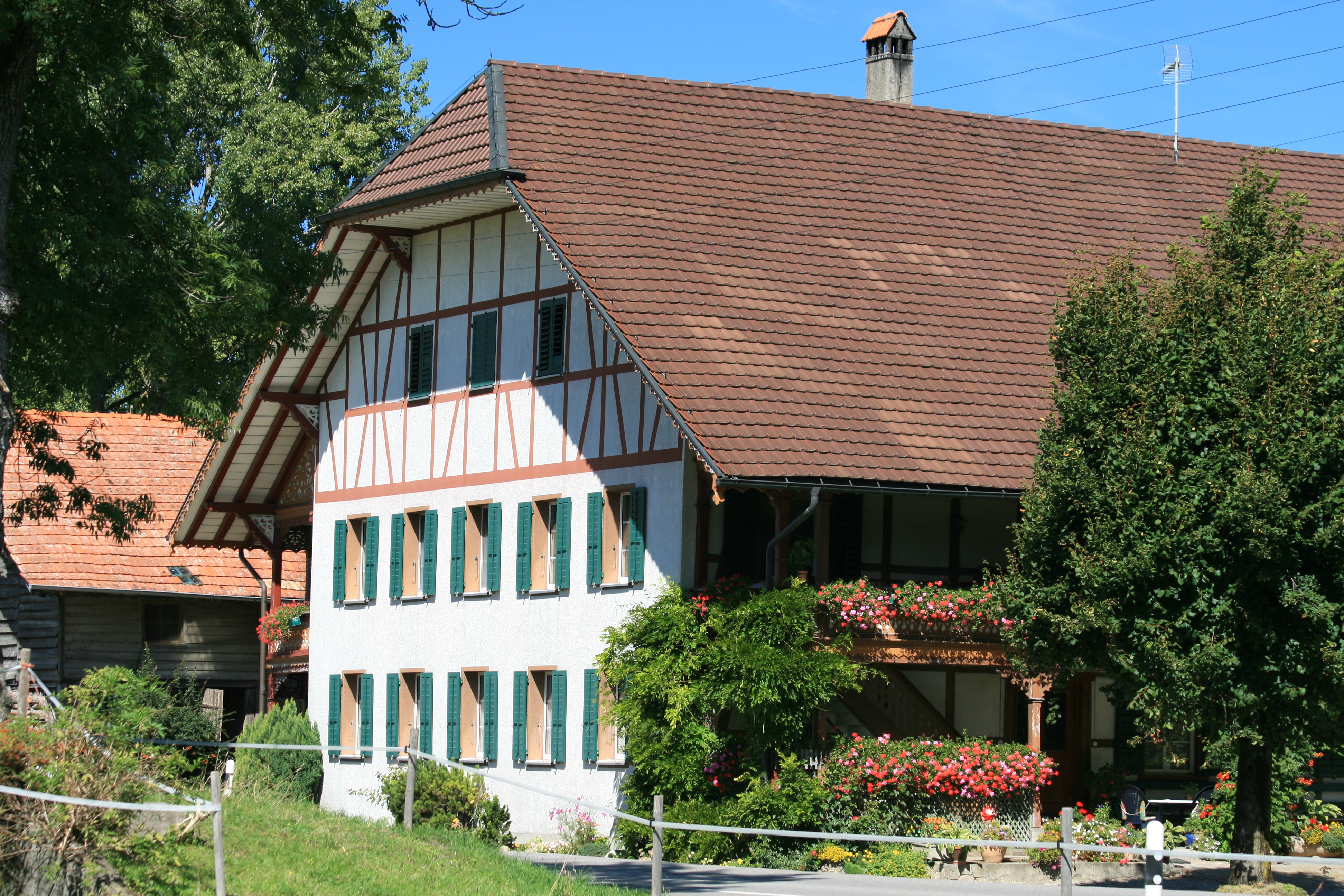 Bauernhaus in Jetschwil, Gemeinde Düdingen, Kanton Freiburg, Schweiz